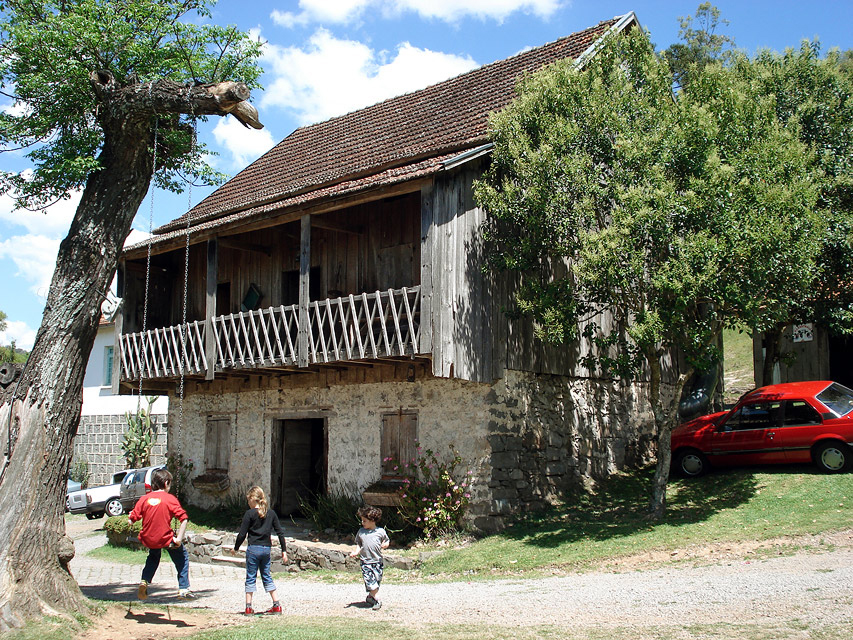 típica casa dos imigrantes italianos na região de Caxias do Sul, Brasil.